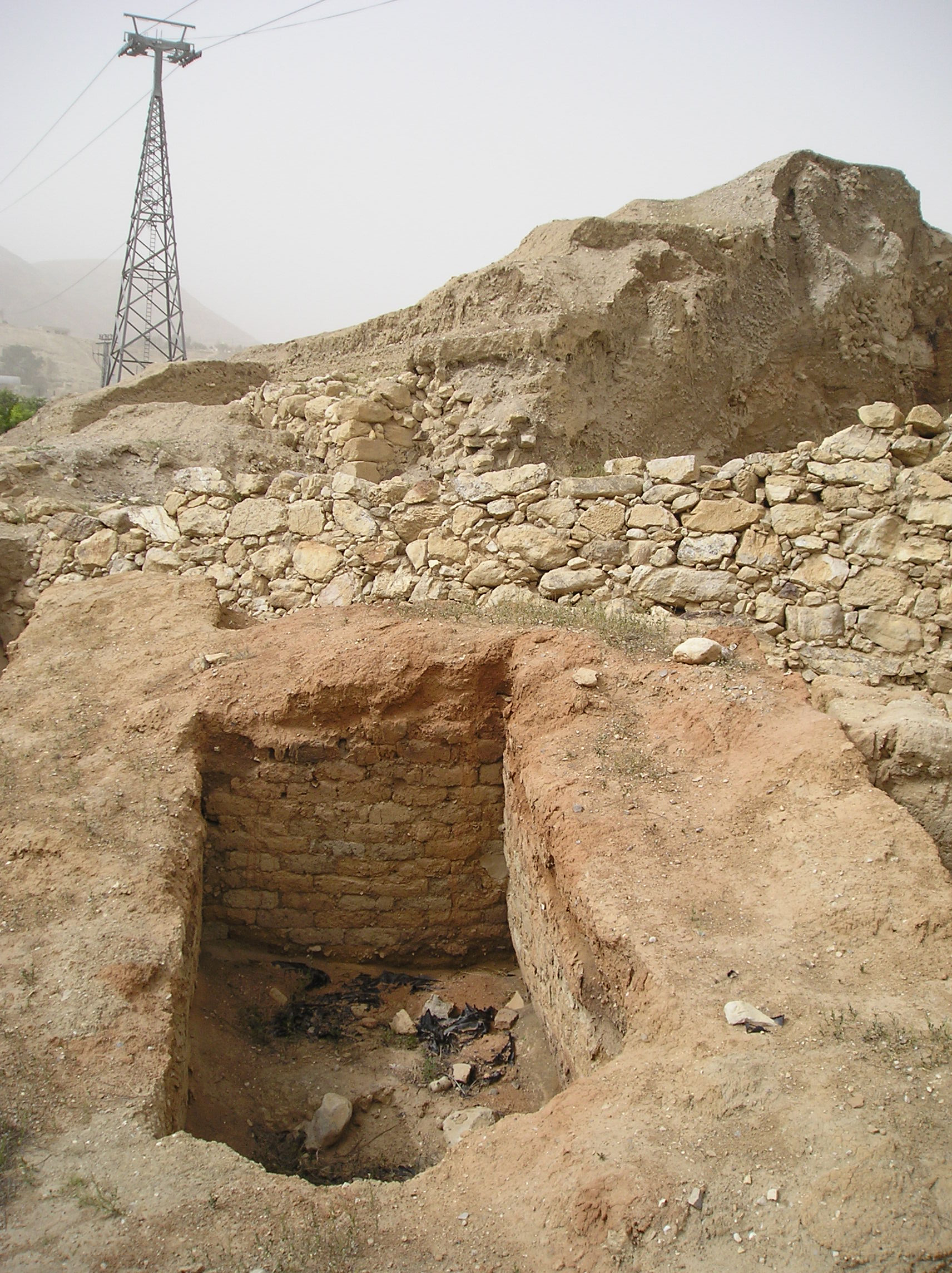 Wykopaliska na Tell es-Sultan w Jerychu (Autonomia Palestyńska). Zdjęcie wykonał A. Sobkowski dn. 9 marca 2006.